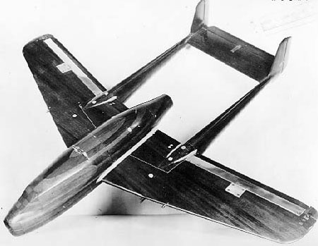 Bell XP-59 wind tunnel model